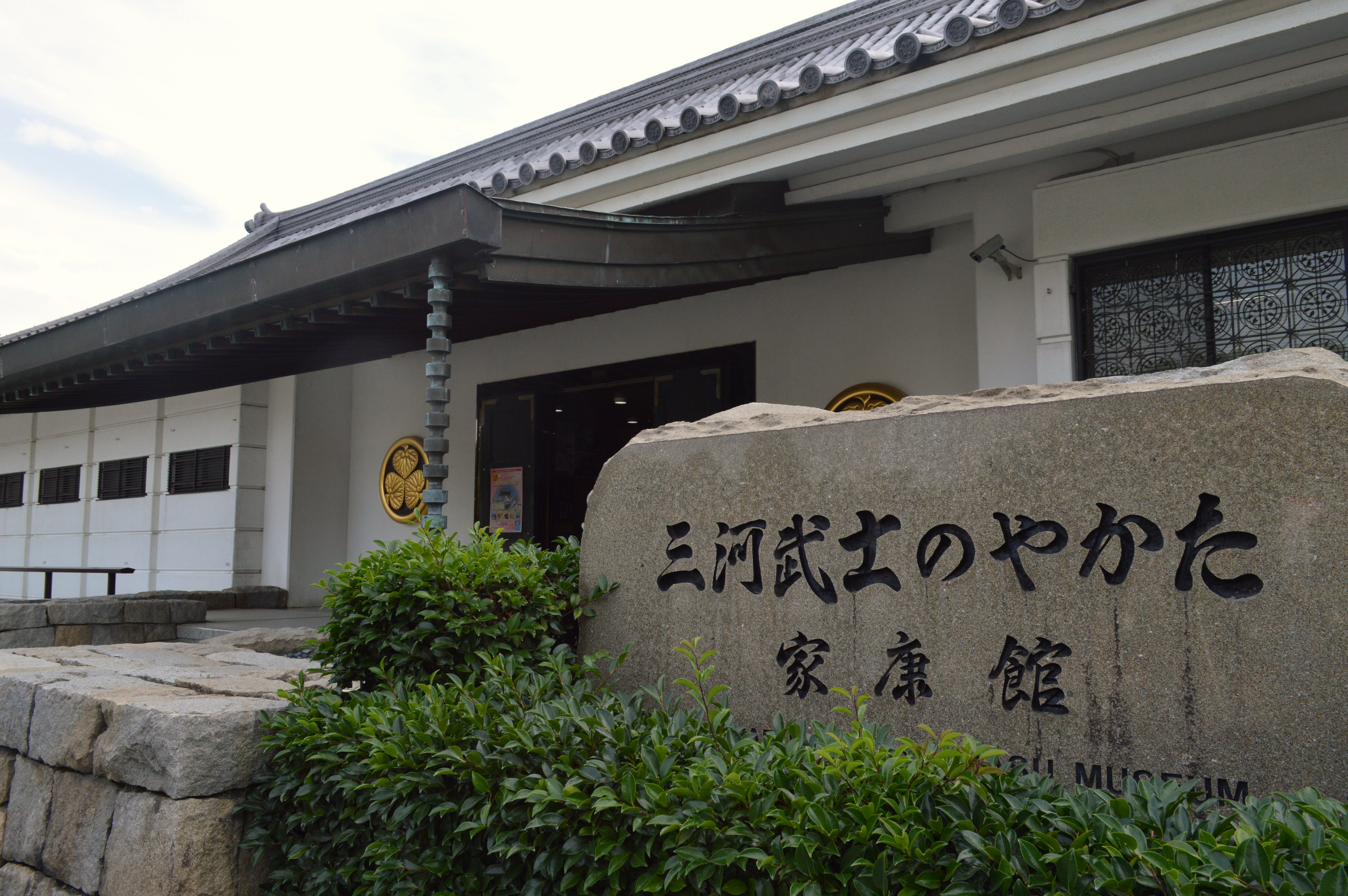 愛知県岡崎市の岡崎公園。家康館。